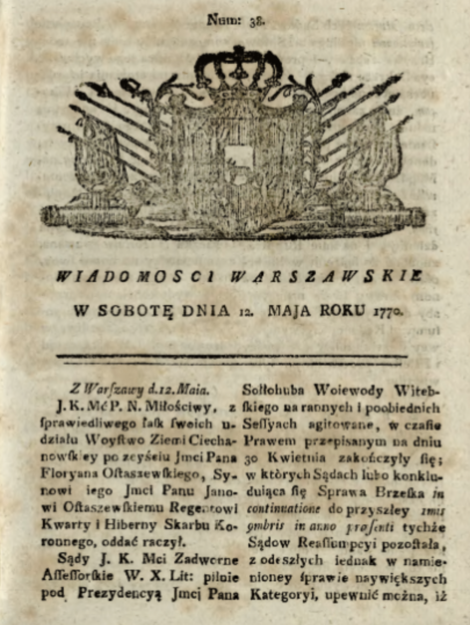 Wiadmości Warszawskie 1770 nr 38 z 12 maja 1770